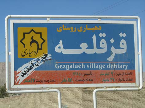 نمایی از تابلوی ورد به قزقلعه که در بخش جنوبی روستای قزقلعه قرار دارد